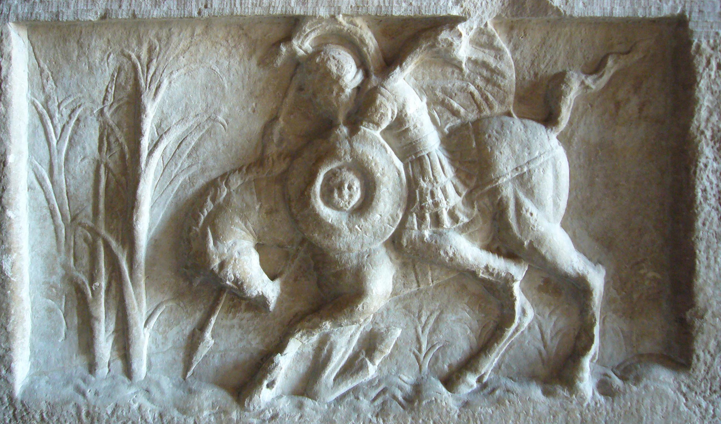 Roma, Tabularium: rilievo originale dell'episodio di Marco Curzio al Lacus Curtius